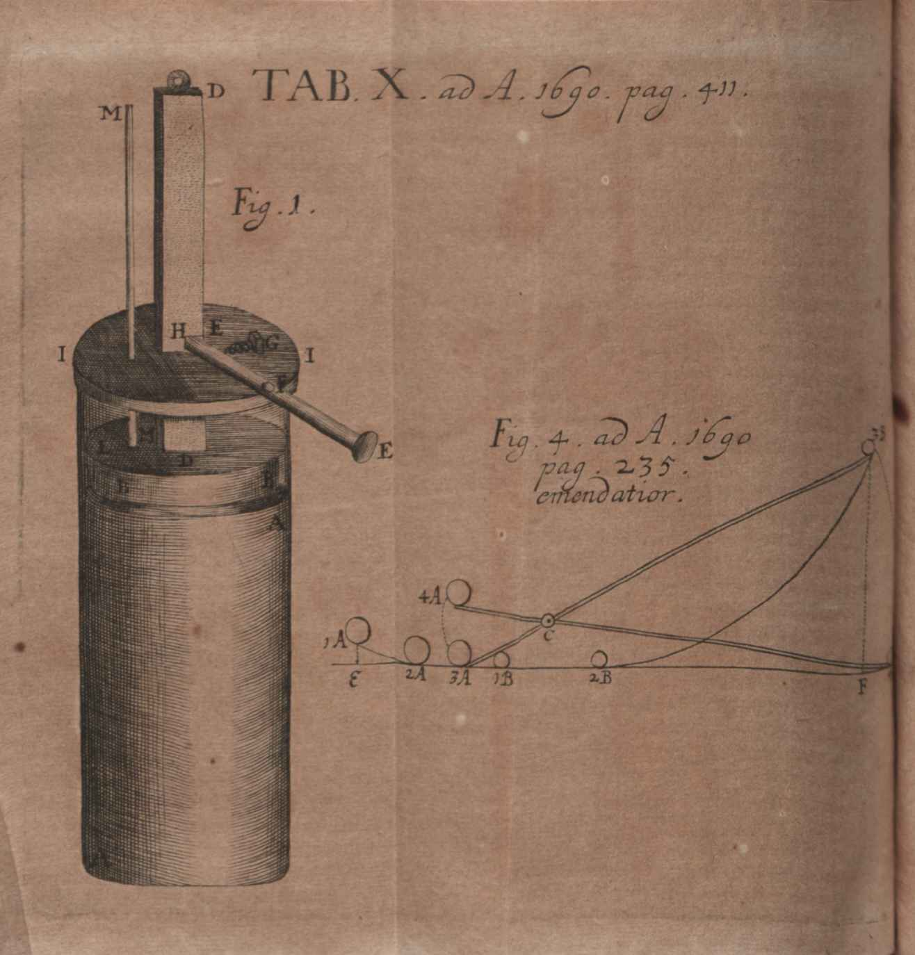 Illustration